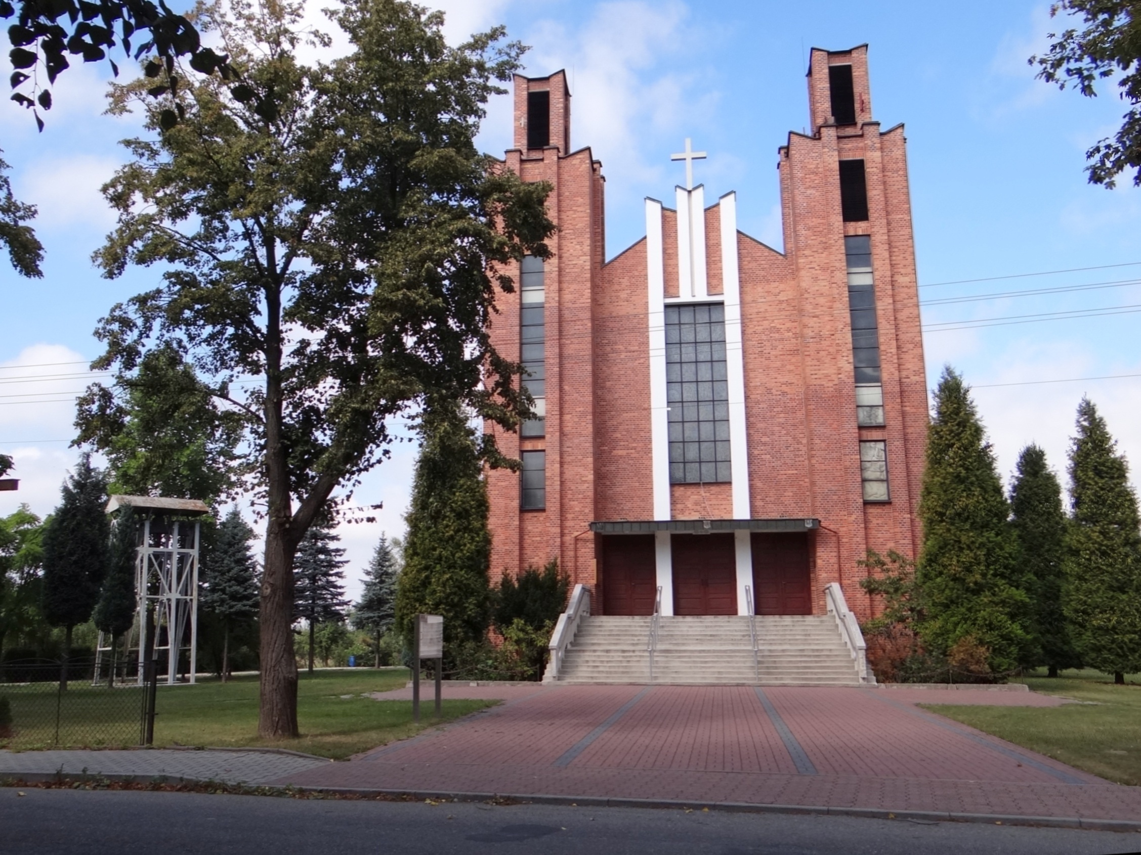 Kościół Matki Bożej Różańcowej w Rudce